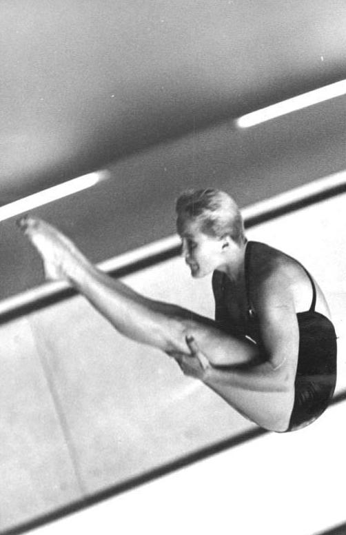 Zentralbild-Kohls Me 19.8.1964 Olympia-Ausscheidungen im Wasserspringen. Schauplatz der ersten Olympia-Ausscheidungen im Wasserspringen ist am 19. und 20.8.64 das Kölner Aggripa-Bad. Um die Flugtickets nach Tokio bewarben sich in jeder der insgesamt vier Disziplinen je vier Aktive aus beiden deutschen Verbänden. Eine Woche später findet in der Rostocker Neptun-Schwimmhalle mit gleichem Programm der Rückkampf statt. UBz: Ingrid Engel-Krämer (SC Empor Rostock), Deutsche Meisterin und zweifache Olympia-Siegerin, beim Training im Turmsprigen am 18.August im Kölner Agrippa-Bad.